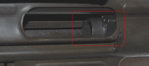 Patronlägeslås på AK4